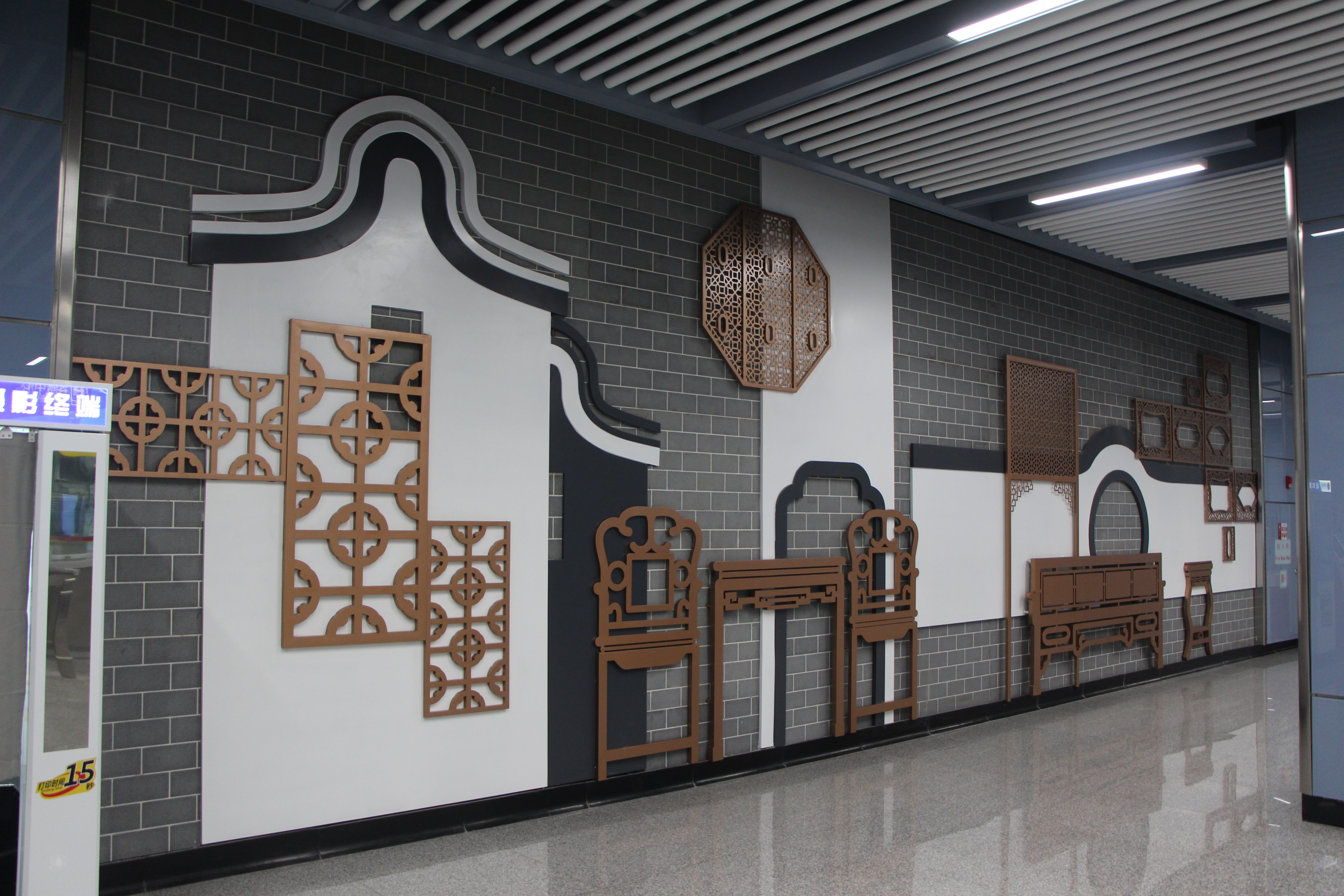 广州地铁南村万博站